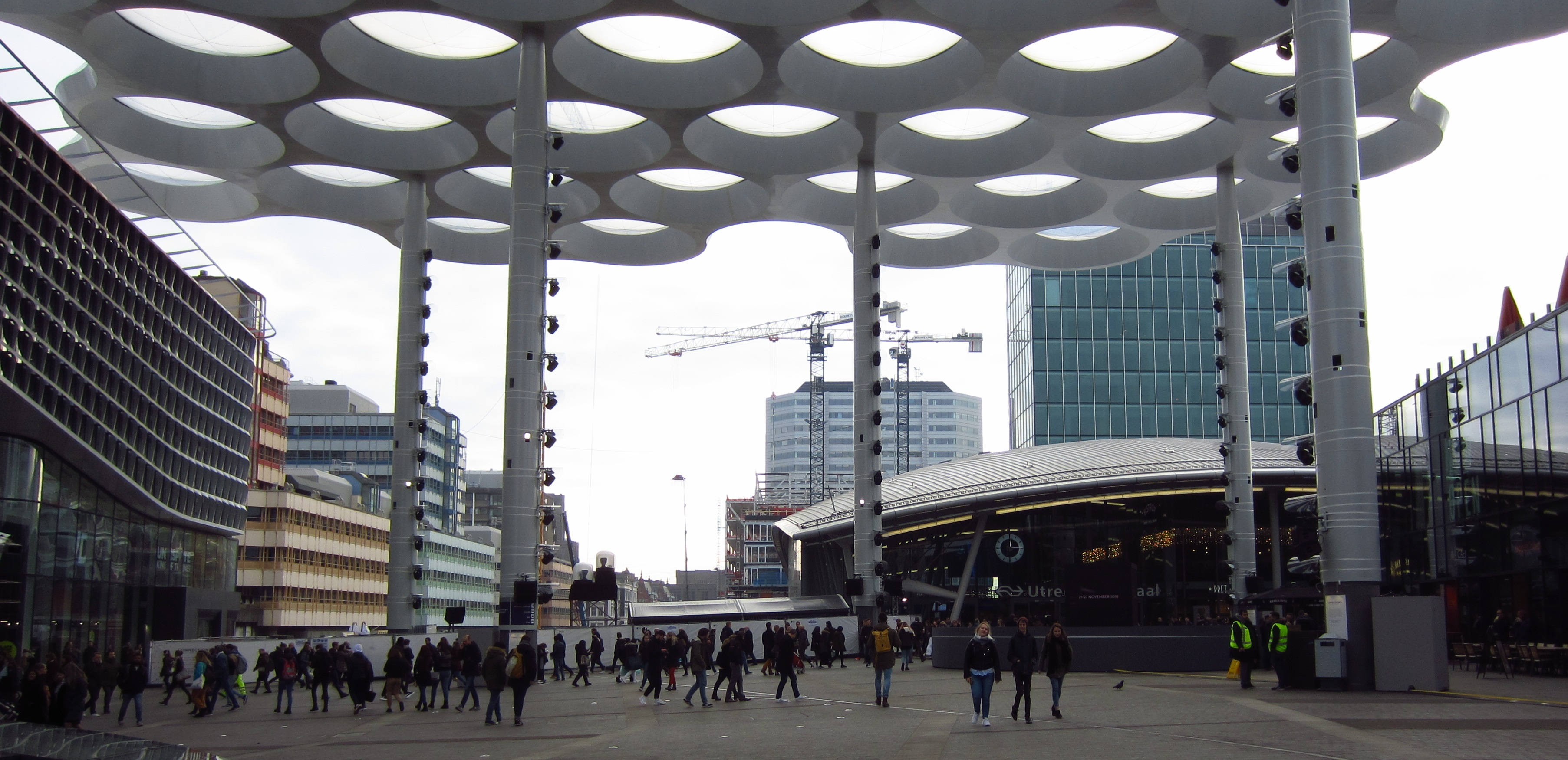 2018-11-23 Stationsplein Utrecht